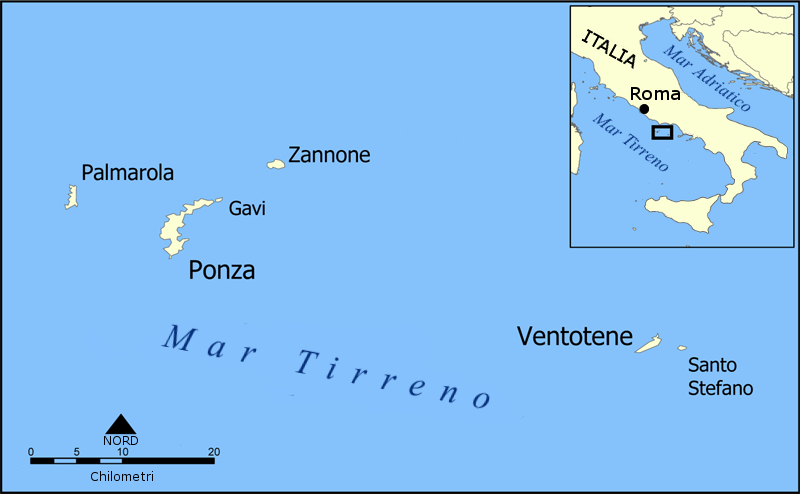 Mappa delle isole pontine in lingua italiana